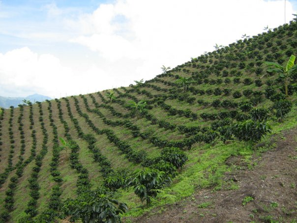 terreno con cultivo de cafe